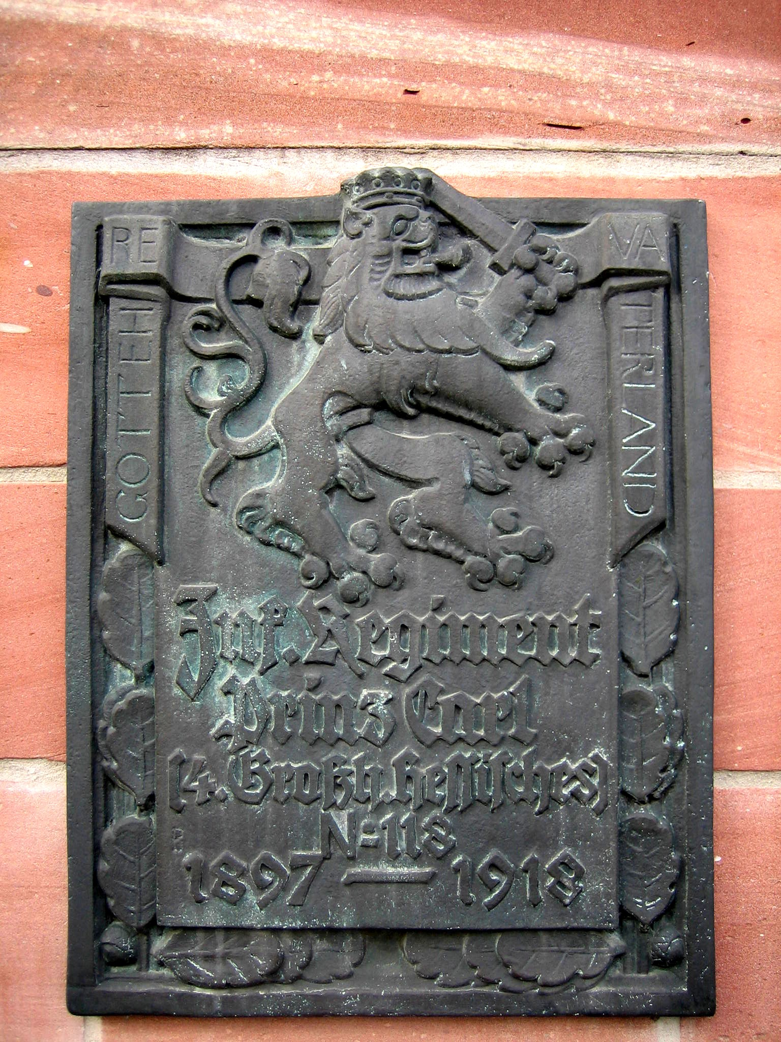 Plaquette sur le Prinz-Carl-Anlage à Worms (ville) aujourd'hui centre de la culture et des services, construit en 1897-1898 en tant que prince Carl-caserne pour le Régiment d'Infanterie "Prince Carl" (4e grand ducal de Hesse) n ° 118. Puis (1918-1930) "Caserne des Vallières" pour le 168e régiment d'infanterie de ligne, puis "Caserne des Kemmel" (1936-1945). Puis (1945-1951) "Quartier Foch".